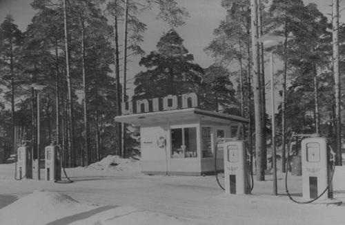 Amurin Union-myyntikoju ja huoltoasema 1950-luvulla.